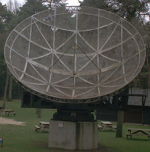 Radargerät FuMG 65 "Würzburg Riese" aus dem 2. Weltkrieg